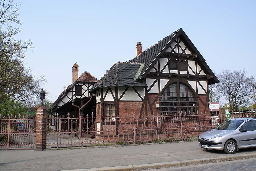 d. dworzec kolejki wąskotorowej pl. Staszica 2a, Miasto Wrocław - Śródmieście